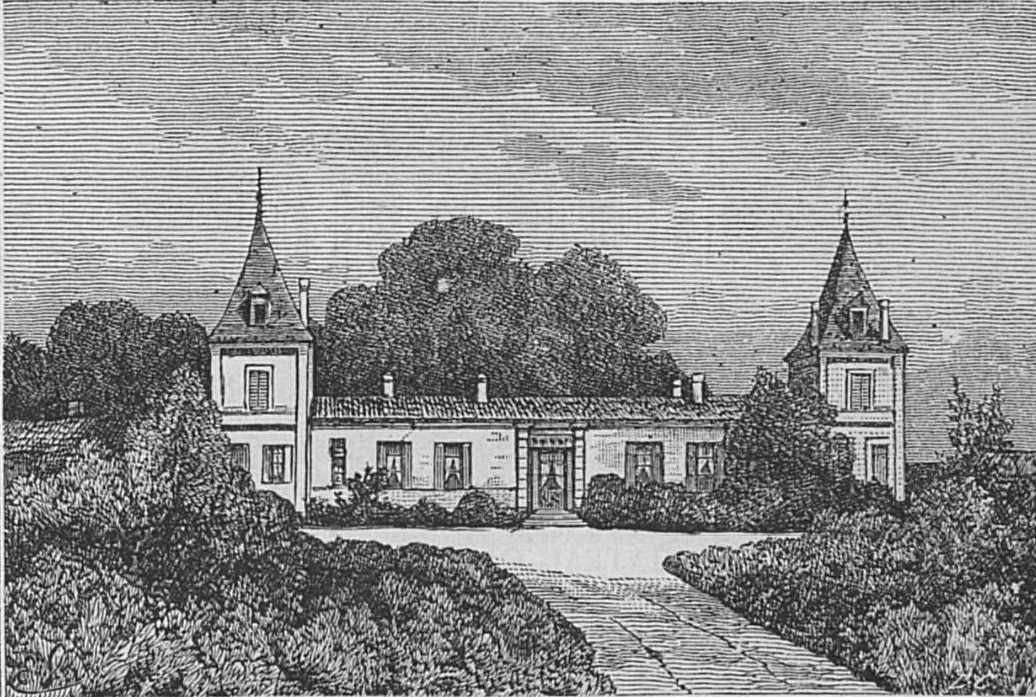 Illustration du Château Climens dans l'ouvrage Bordeaux et ses vins (6ème édition) de Charles Cocks et Edouard Féret publié en 1893